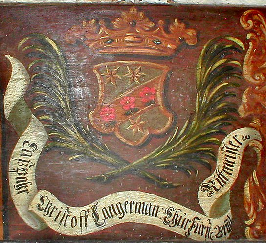 Patronatswappen von Langermann, Predella des Altars der Dorfkirche Nätebow in Bollewick, Lkr. Müritz